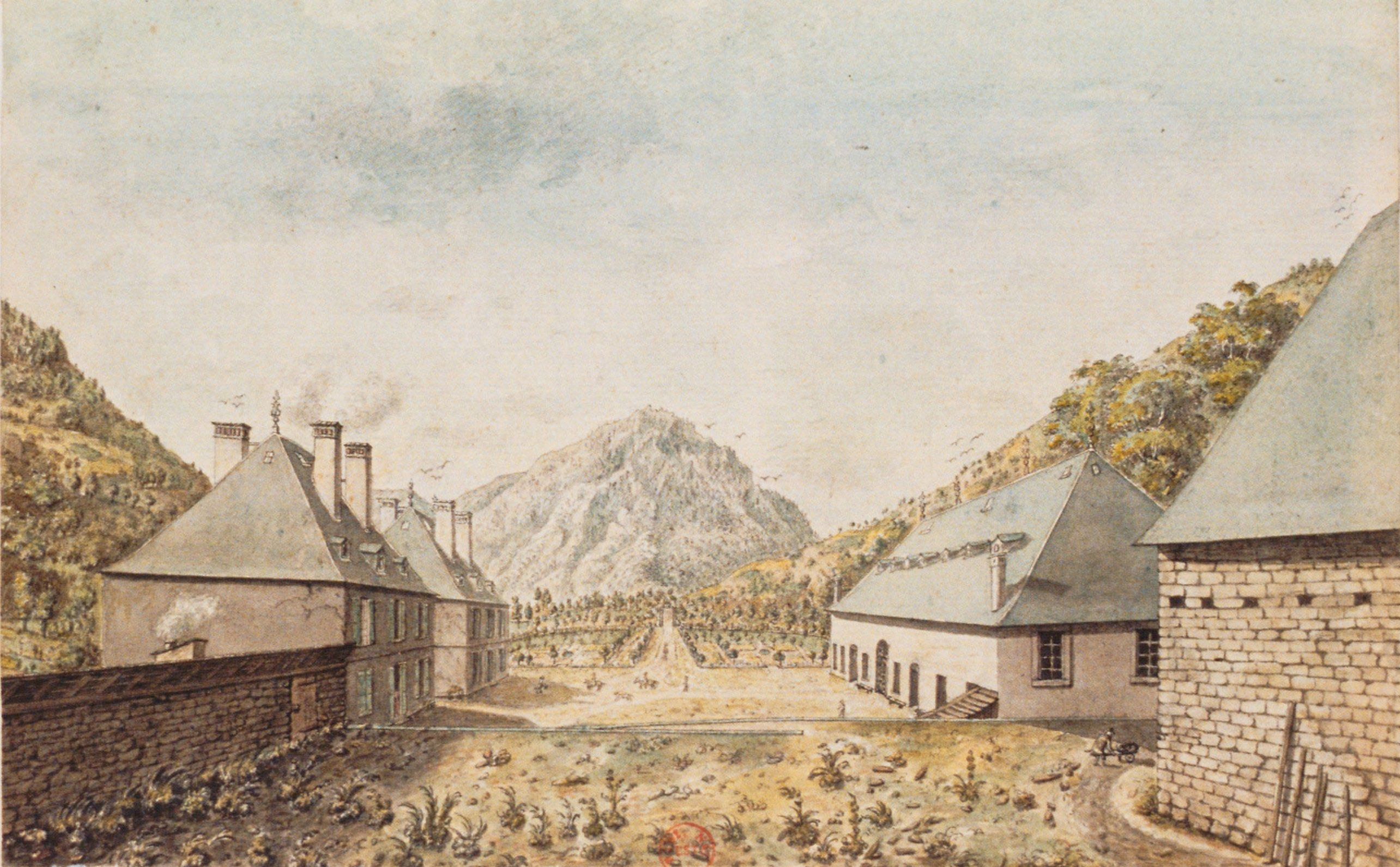 Vue de la fonderie royale d'Allemond : dessin